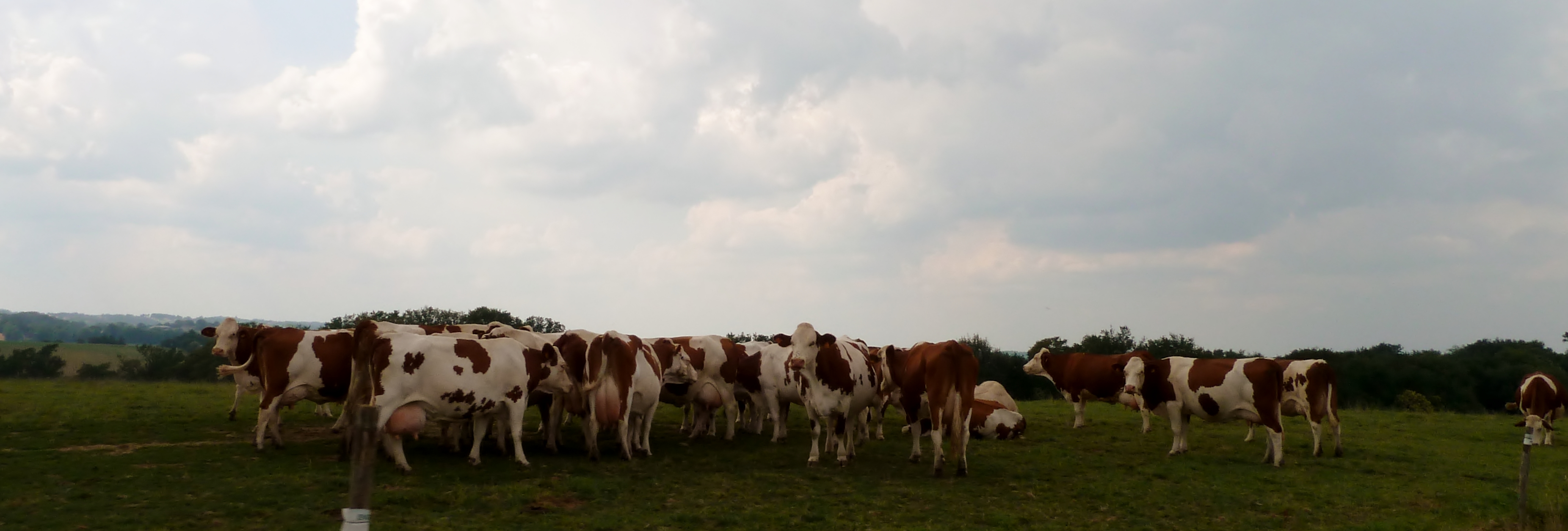 Vaches à Luc-Armau